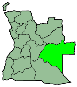 A map from province Moxico, Angola